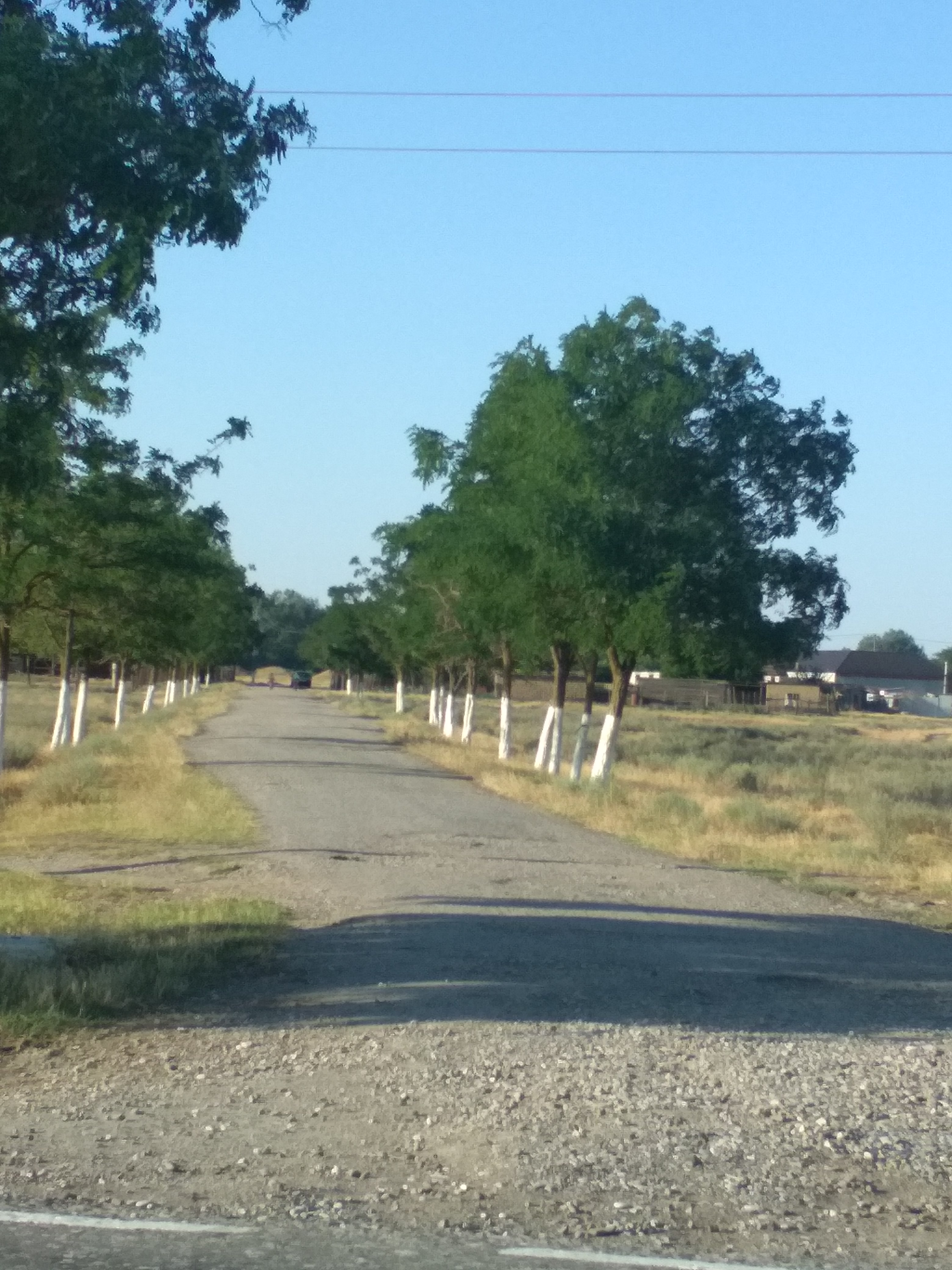 Нохчийн: Эмасуле чувоьду некъ